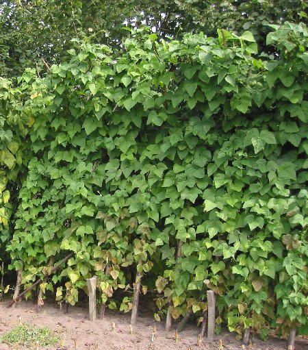 Stokslabonen.